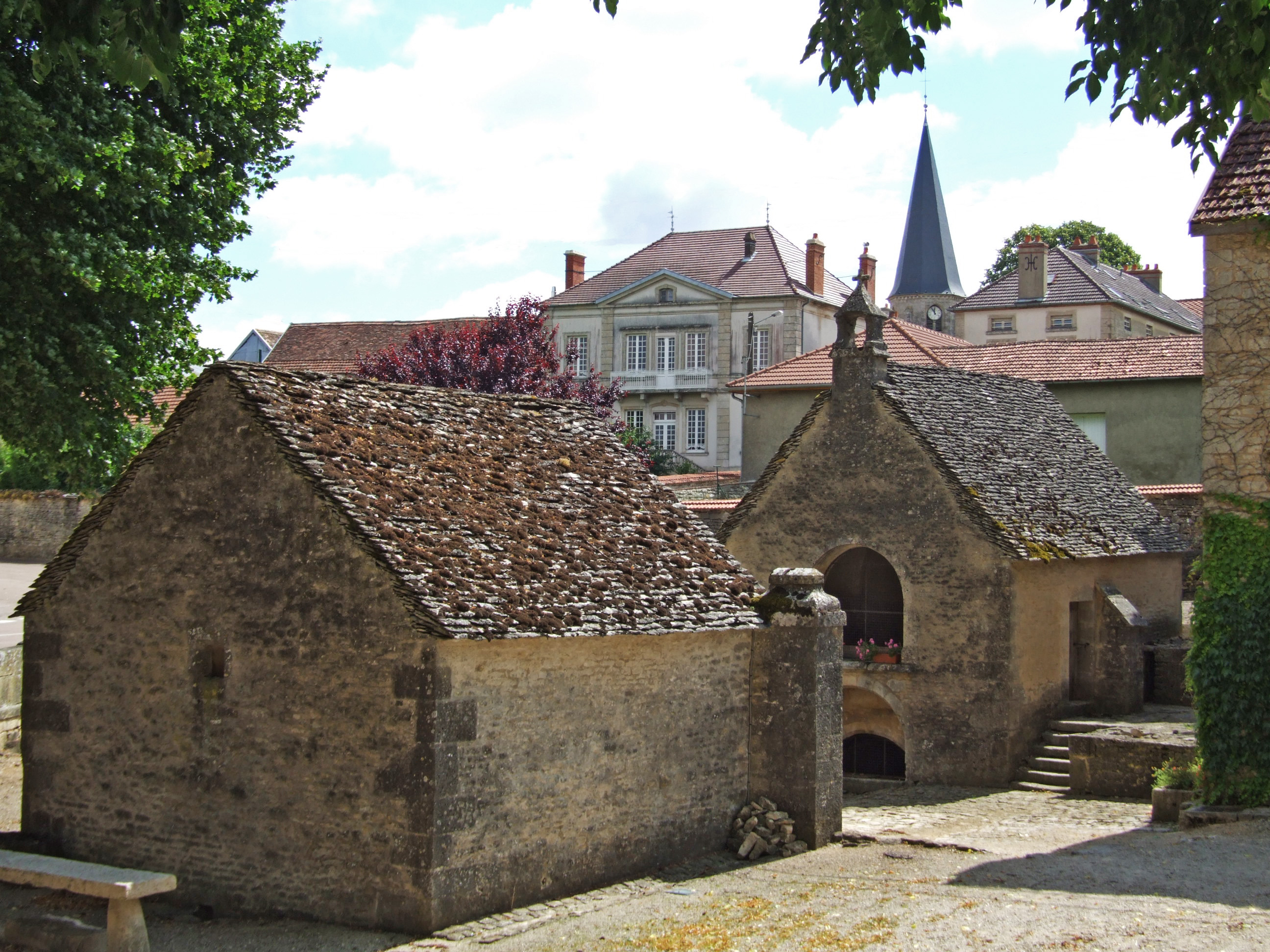 Fontaines-en-Duesmois, Côte-d'Or, Bourgogne, FRANCE